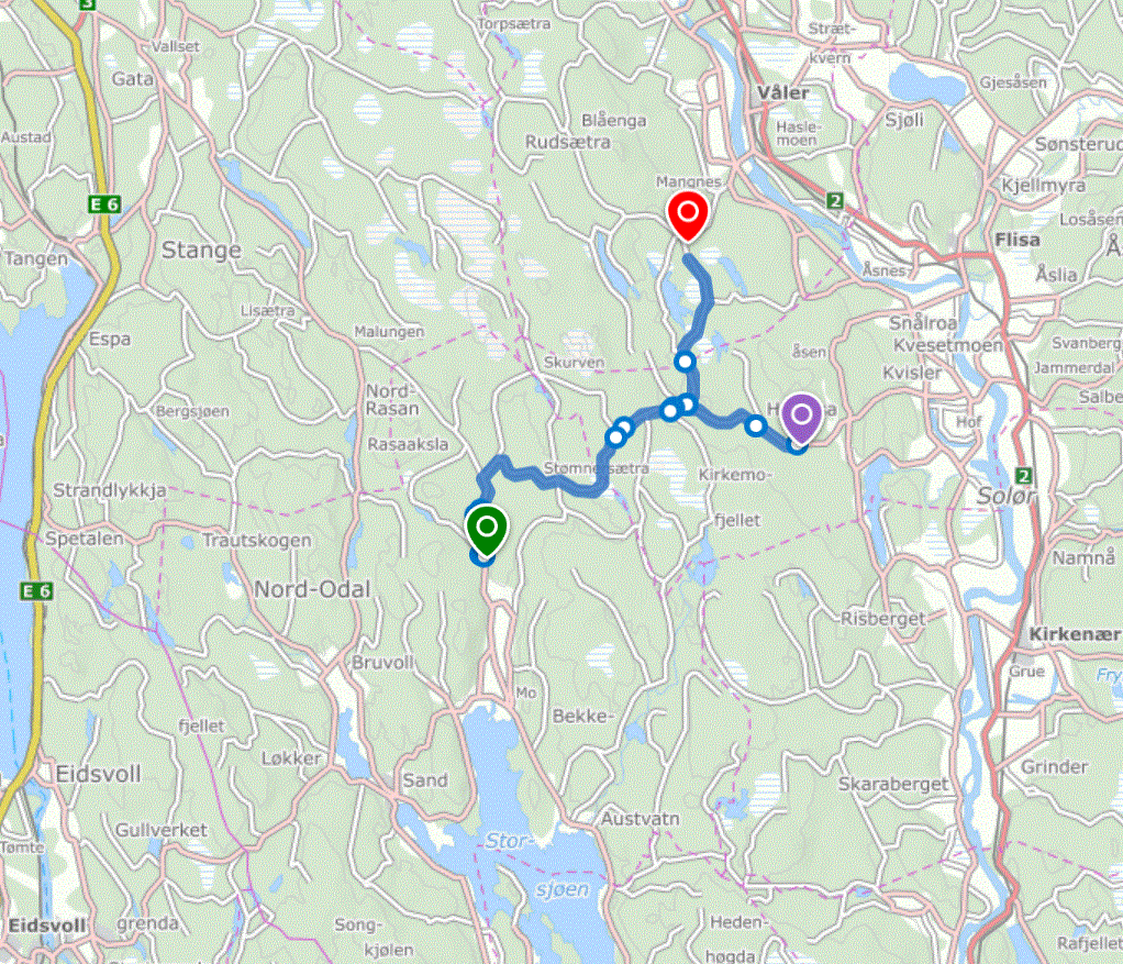 Kart over Solør-Odalsvegen